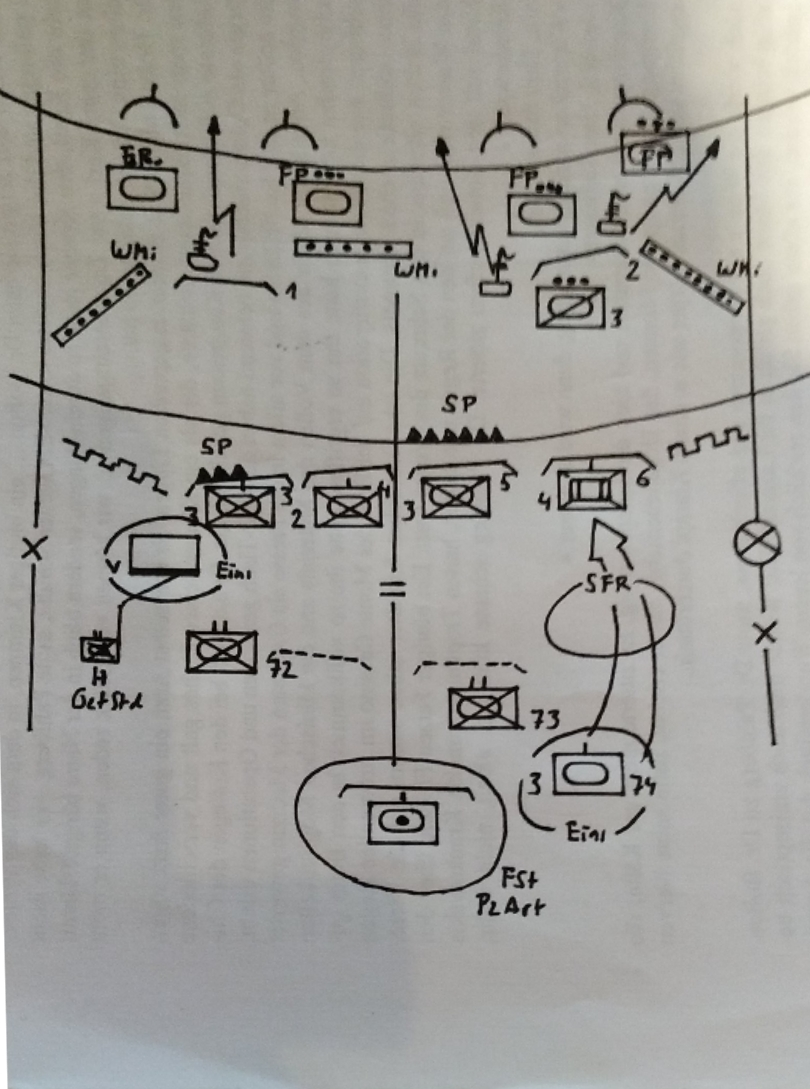 Opplan PzGrenBrig Vtg